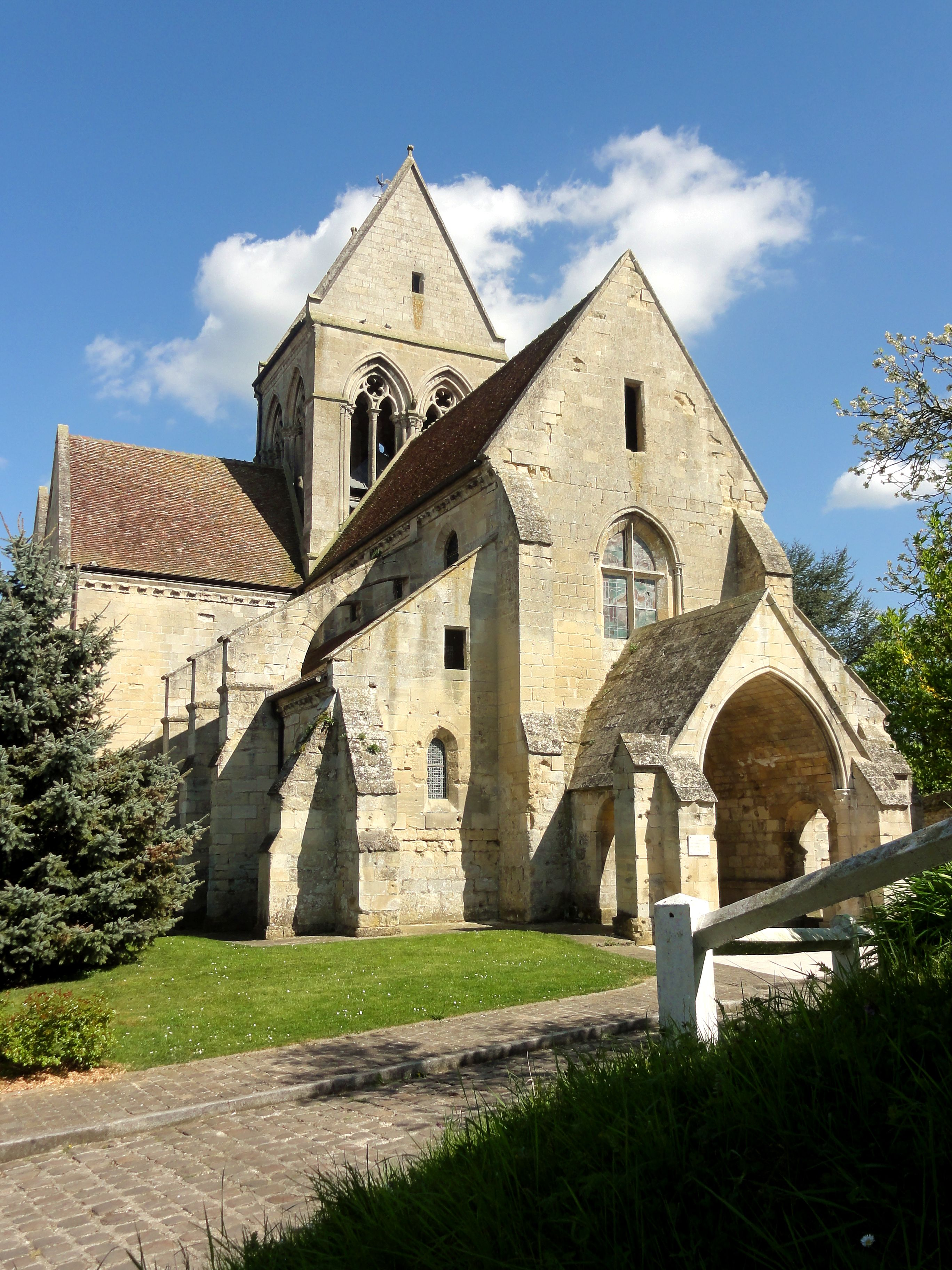 Vue générale depuis le nord-ouest.